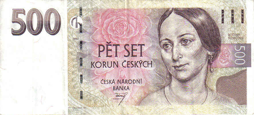 500 Tschechische Kronen Vorderseite